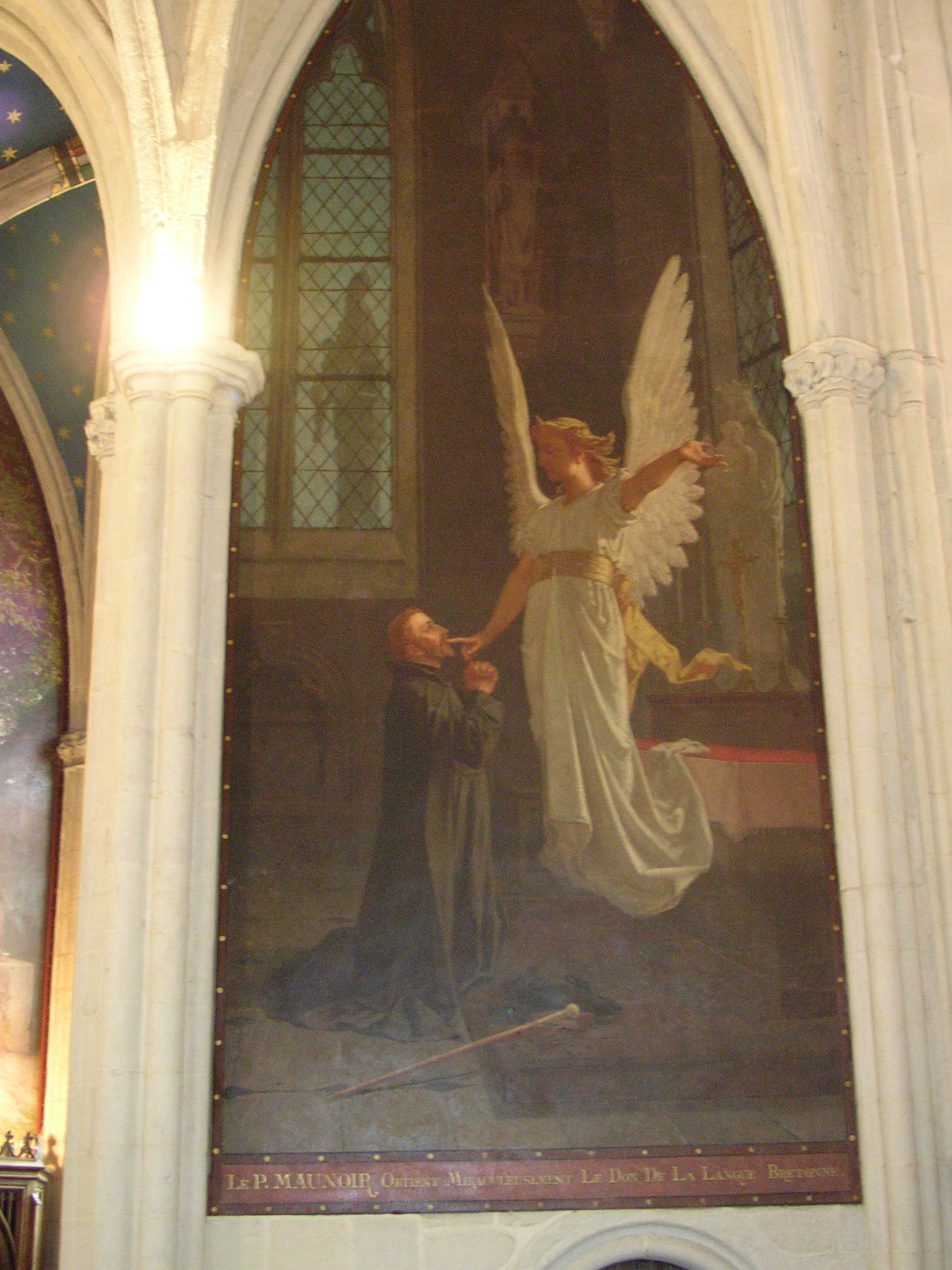 Cathédrale Saint-Corentin de Quimper : tableau du Père Maunoir obtenant miraculeusement le don de la langue bretonne .